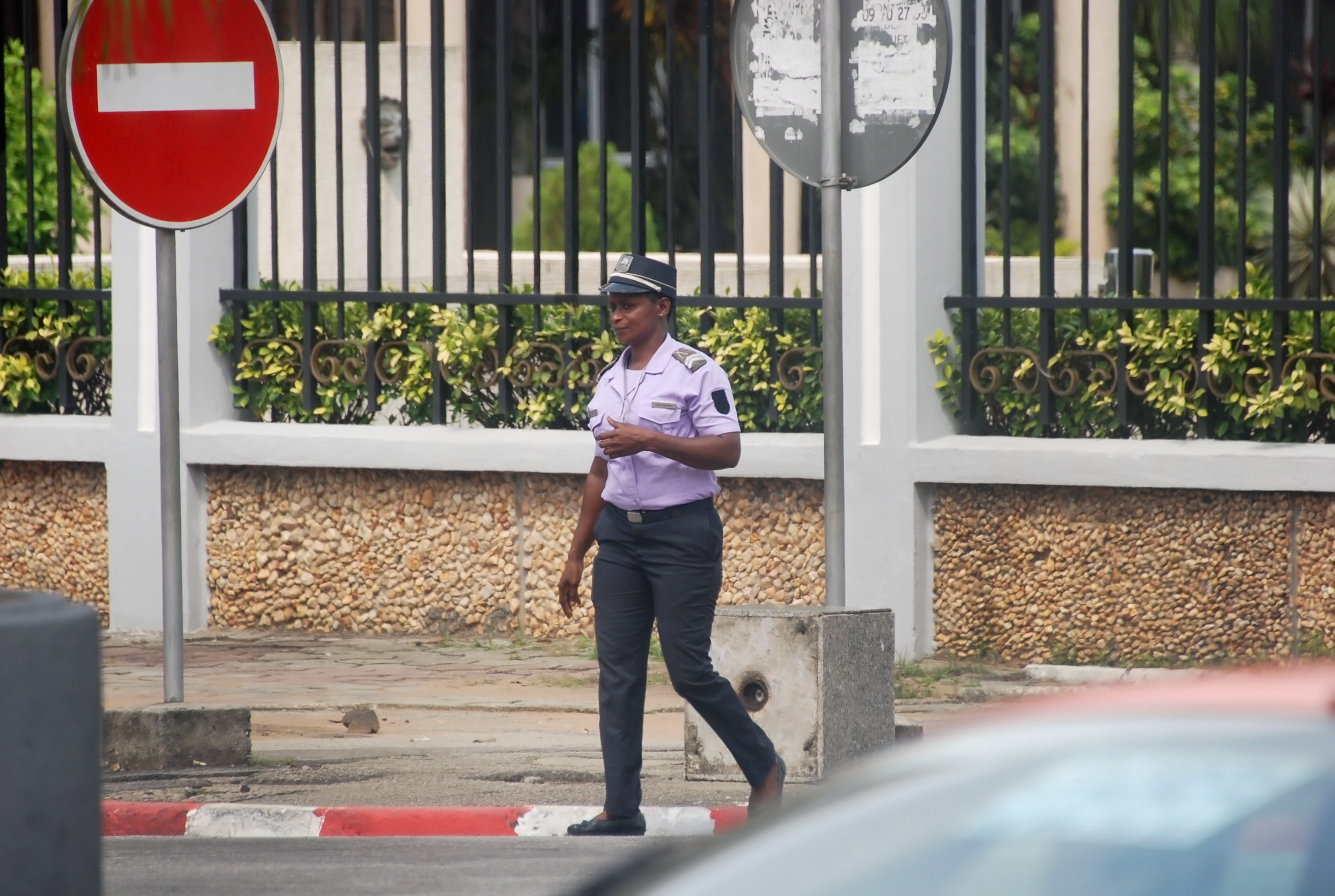 Une femme agent de police dans la ville d'Abidjan, régulant la circulation routière. This is an image of "African people at work" from Ivory Coast